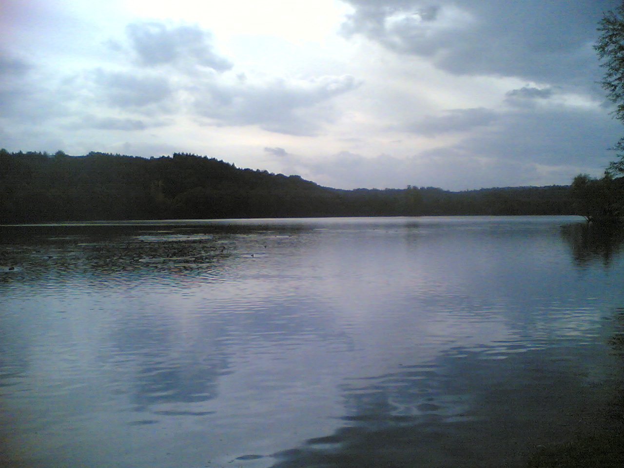 Baggersee "Epple" bei Kirchentellinsfurt, Deutschland